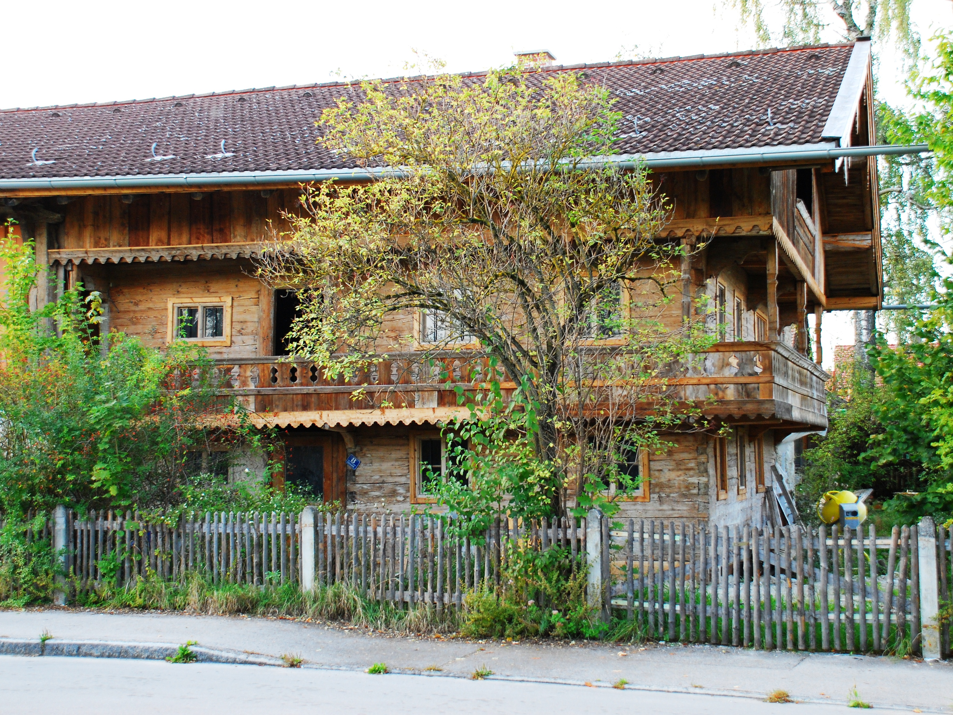 Bauernhaus „Beim Bauernwagner“ in der Bahnhofstraße 8 in Sauerlach, Landkreis München, Regierungsbezirk Oberbayern, Bayern. Als Baudenkmal unter Aktennummer in der Bayerischen Denkmalliste aufgeführt. Laut Denkmalliste Mitte des 17. Jahrhunderts errichtet. Laut Gebäudetafel der Gemeindeverwaltung ältestes erhaltenes Bauerhaus im Gemeindegebiet und als Vorsthueb zeitweise im Besitz der Forstverwaltung des Klosters Tegernsee.